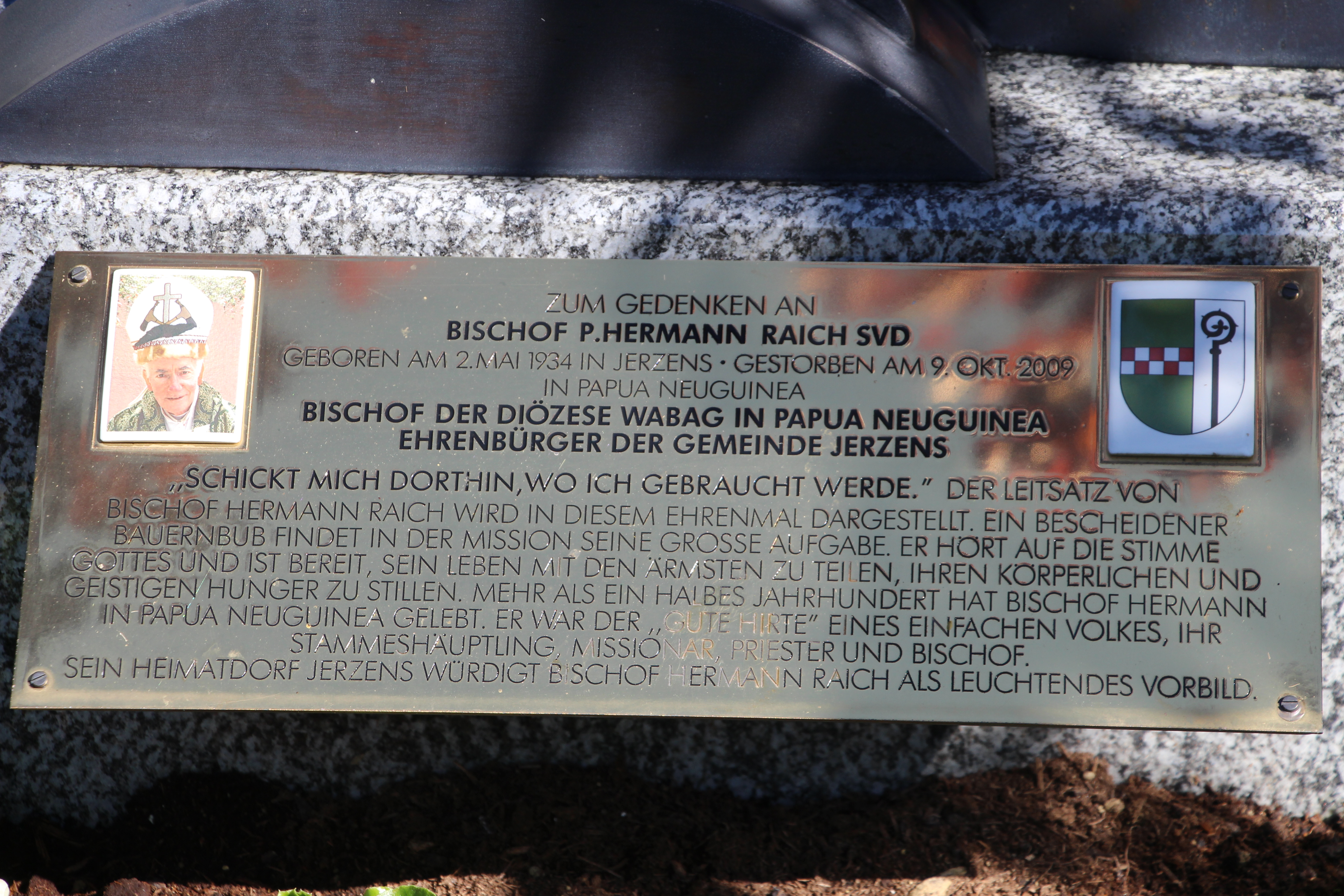 Grab von Bischof Hermann Raich, Jerzens